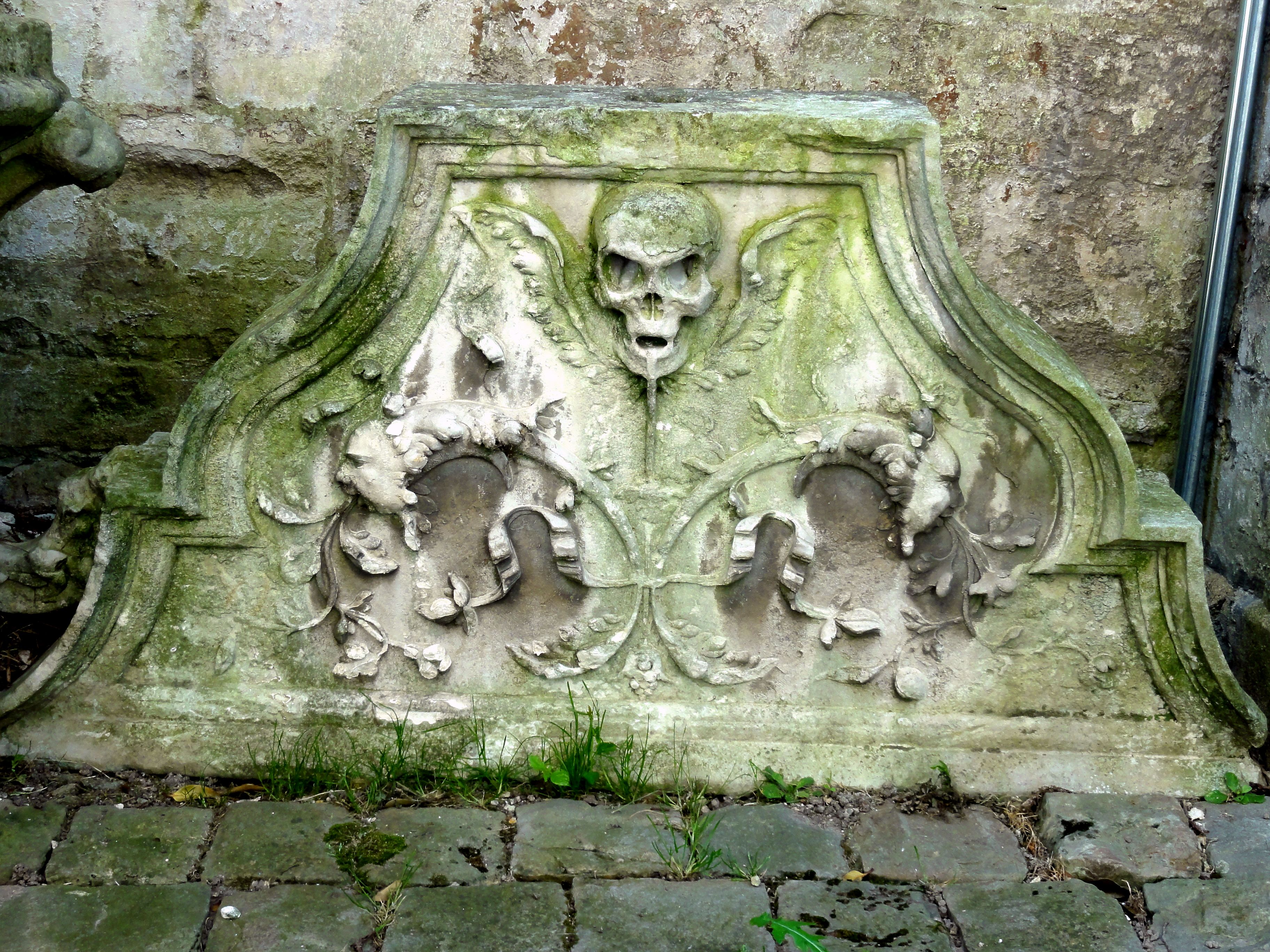 Fronton Renaissance de la précédente église (au musée Tavet-Delacour).